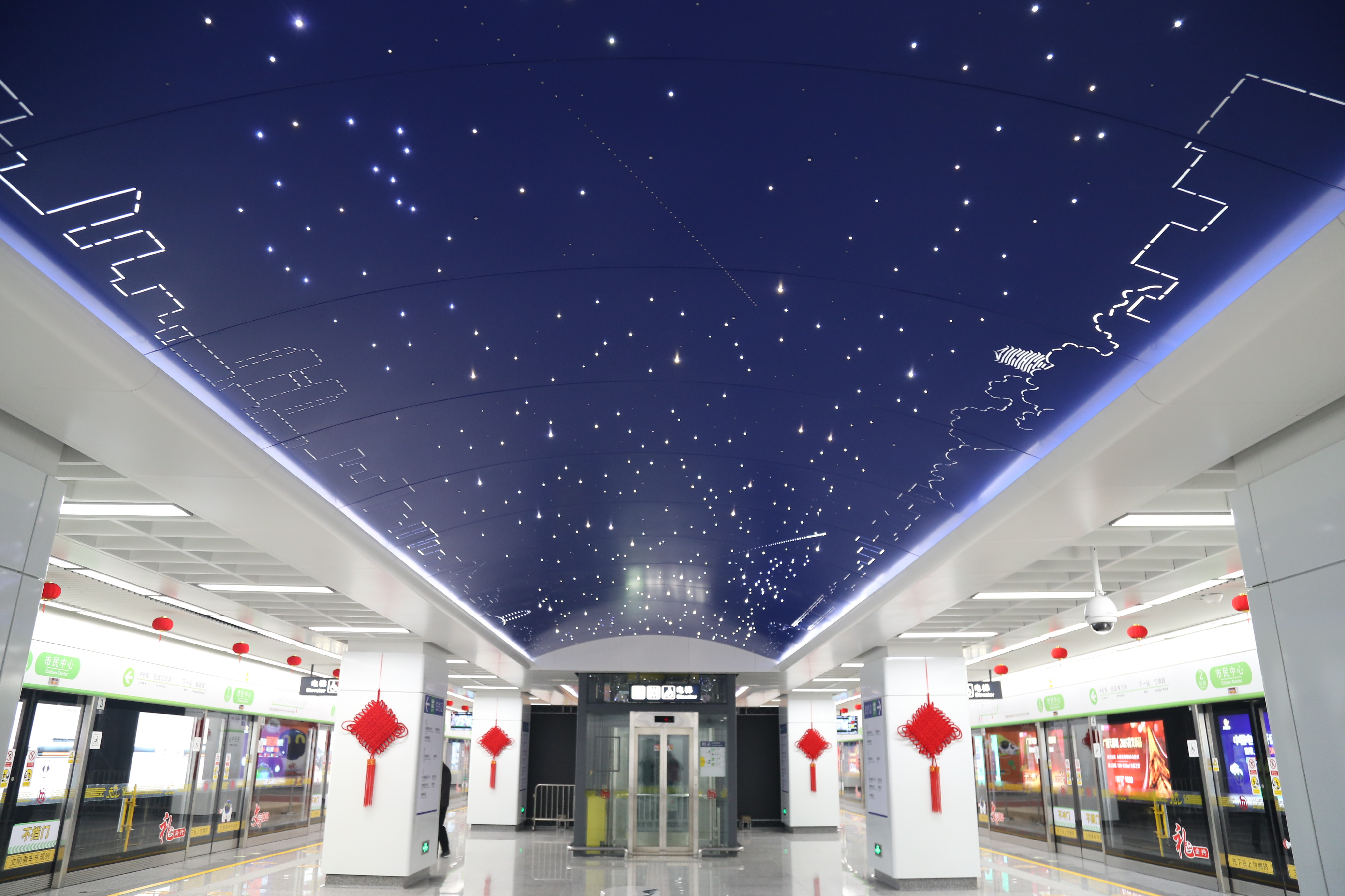 市民中心站LED星空穹顶